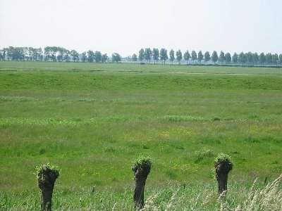 Weidegebied langs de Wijde Aa in Zuid Holland